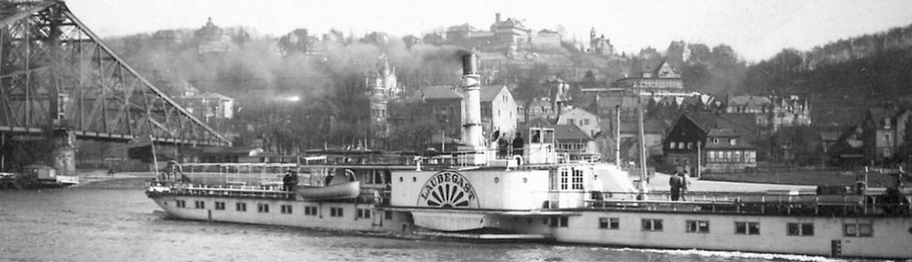 Raddampfer Laubegast in Blasewitz